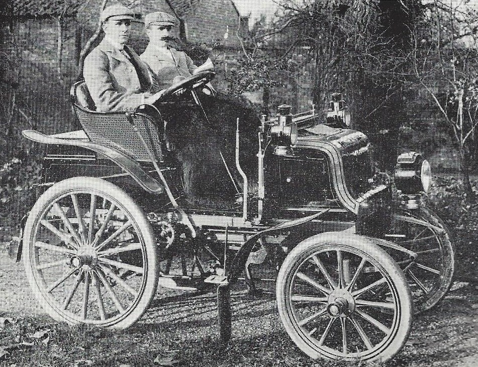 La Panhard et Levassor deuxième de Paris-Marseille-Paris 1896 avec M. Merkel et René de Knyff, puis modifiée par Montague Napier en 1898, et ici entre les mains de Charles Jarrott (G) et S.F. Edge (D) vers 1901.